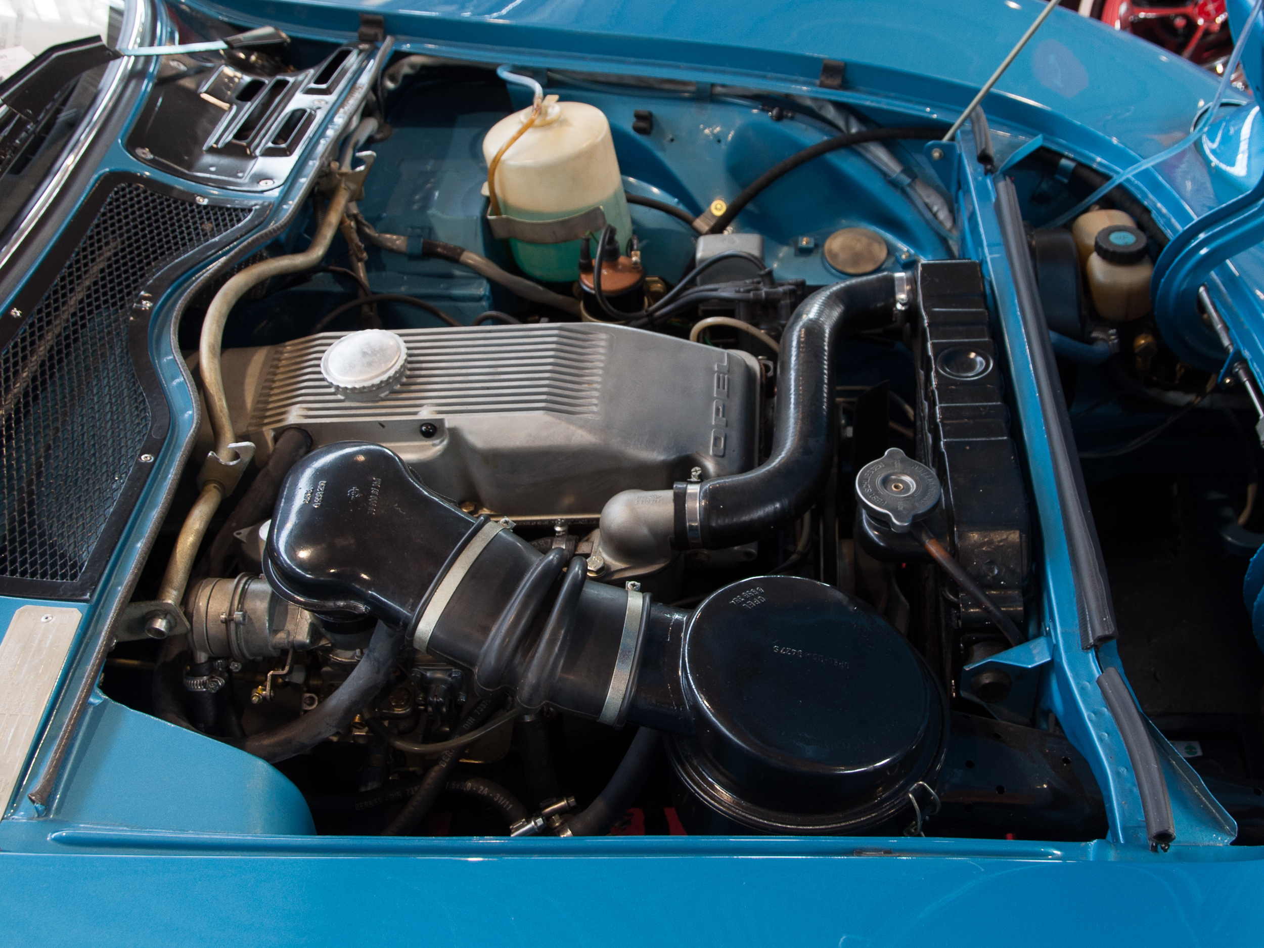 1970 Opel GT 4-Zylinder Reihenmotor